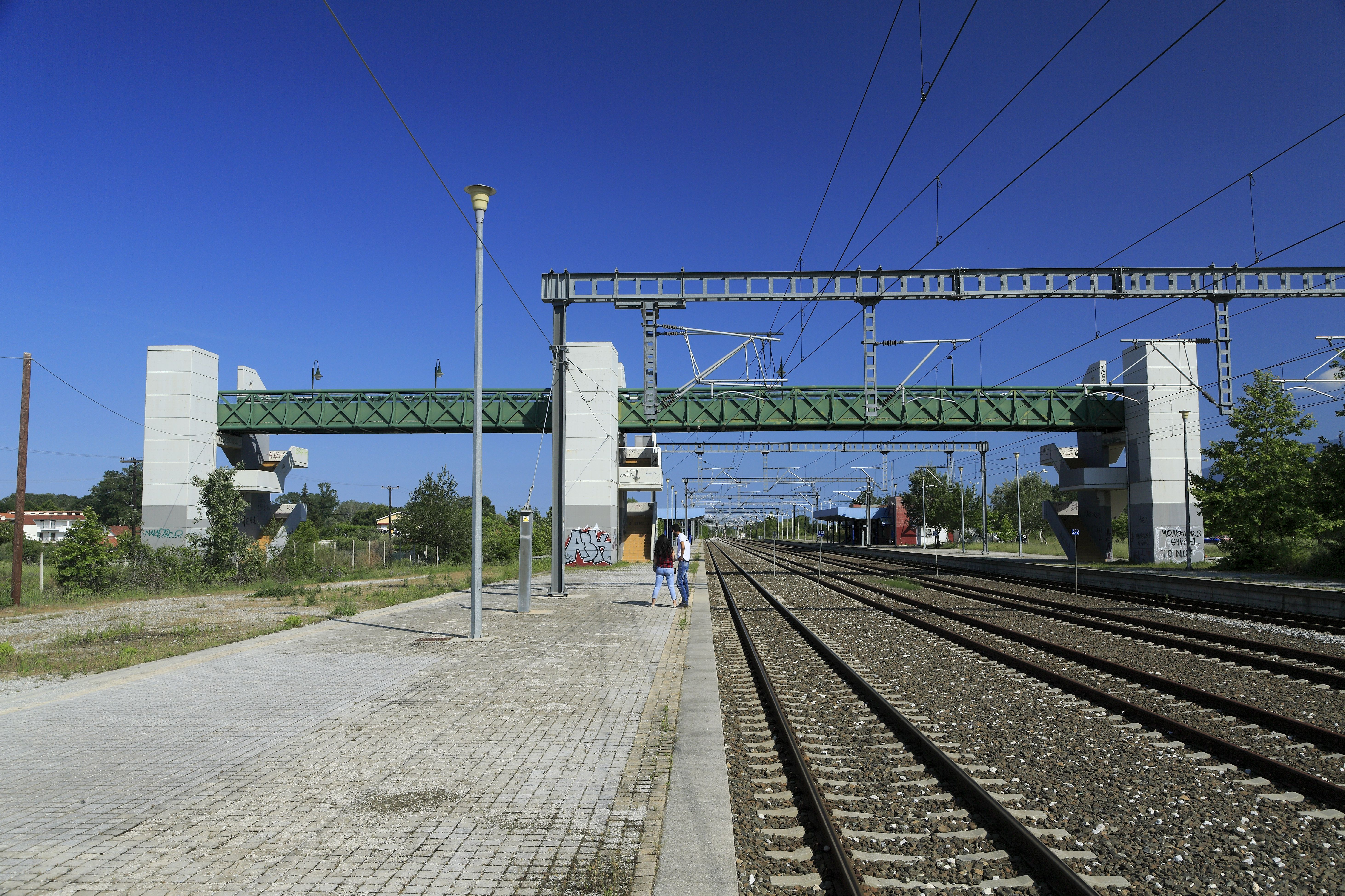 mit großzügiger Fußgängerbrücke und drei Aufzügen. Der linke Zugang war für den übergangsweisen Betrieb über die alte Streckenführung durch Platamónas notwendig. Möglicherweise ist auch vorgesehen, das Gleis an der dritte Bahnsteigkante links in Richtung Norden ebenfalls einzubinden. Ansonsten wäre der linke Aufzugsturm eine Investitionsruine.